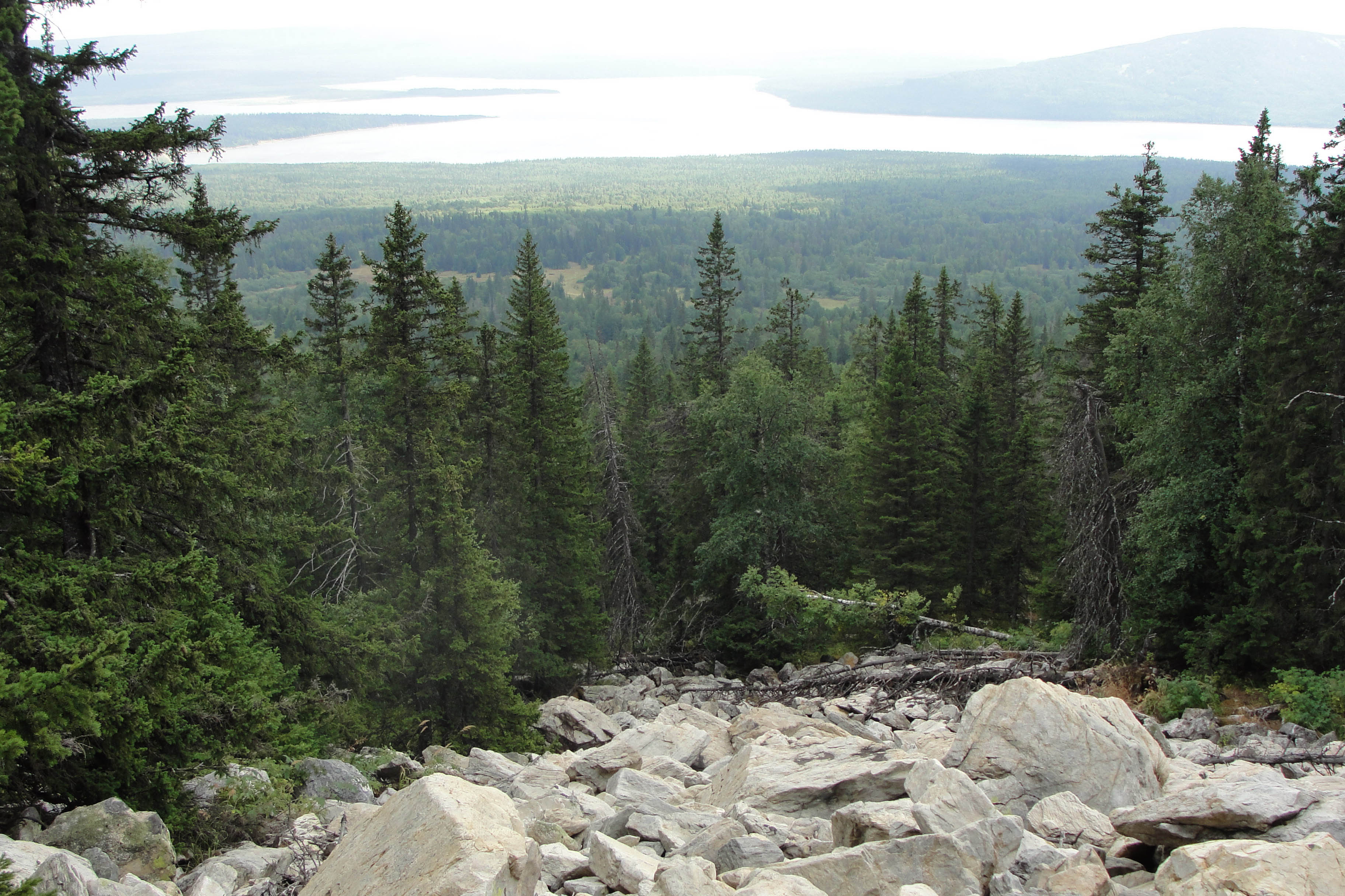 Каменная река - Курумник на хребте Зюраткуль. Внизу видно небесное озеро